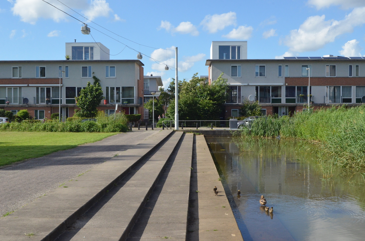 Lanenkwartier met Kröller-Müllerpark. Foto: Erik Swierstra.